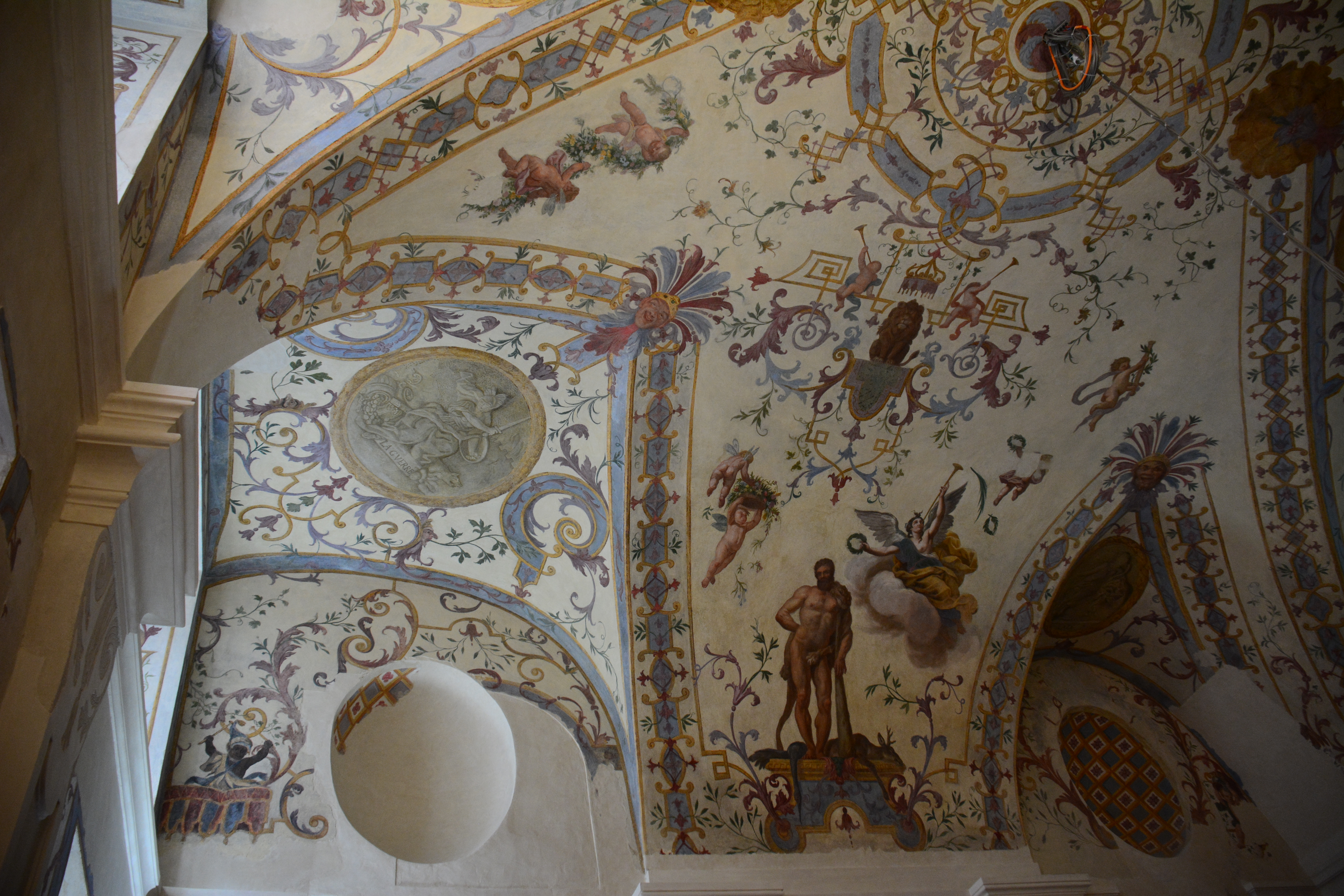 Belvedere – Winterpalais, Sala terrena Dieses Bild wurde anlässlich des österreichischen Tags des Denkmals 2014 in Wien eingereicht.